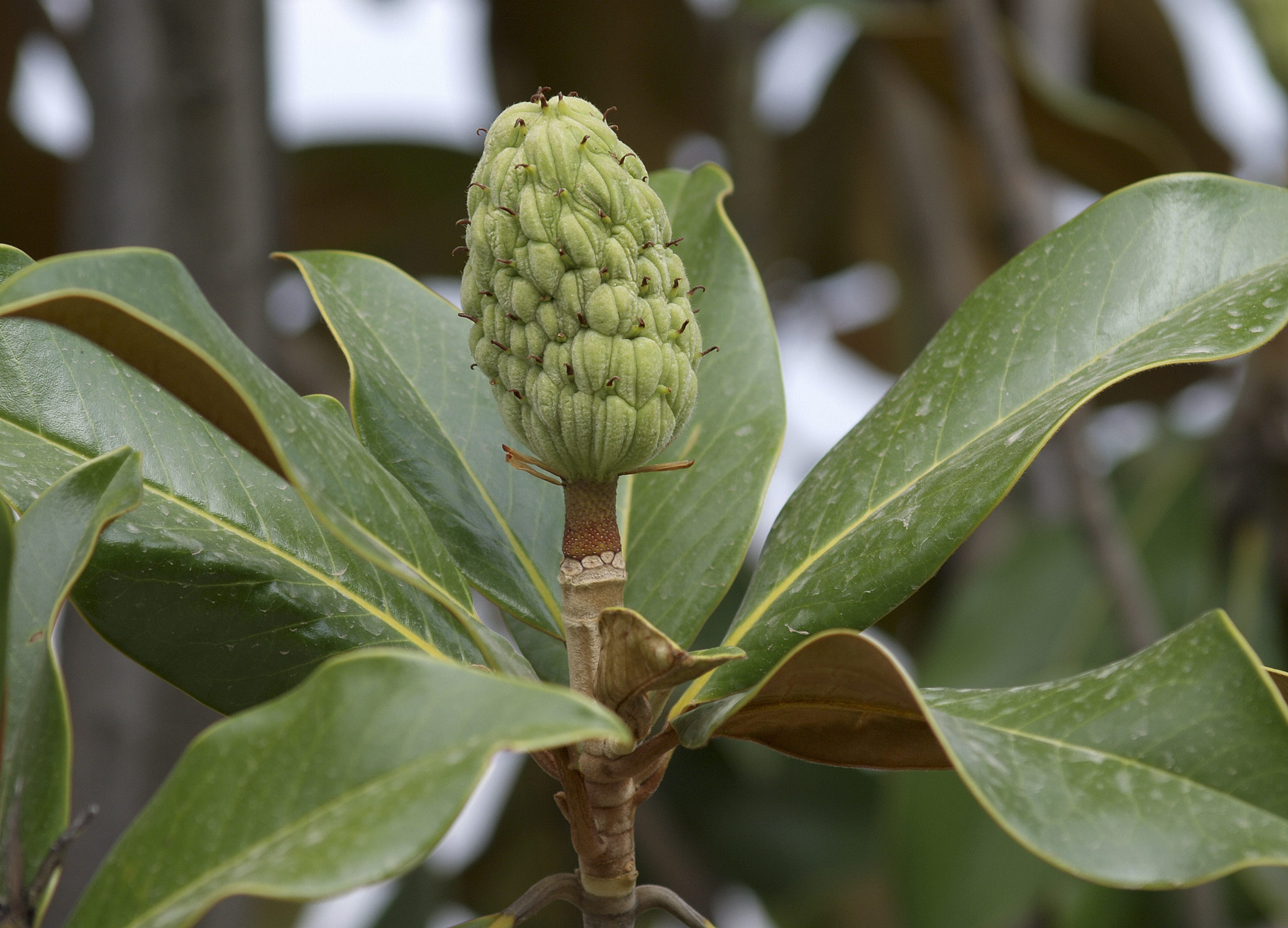 Magnolia grandiflora, fruto temprano. Parque del Oeste, Madrid.